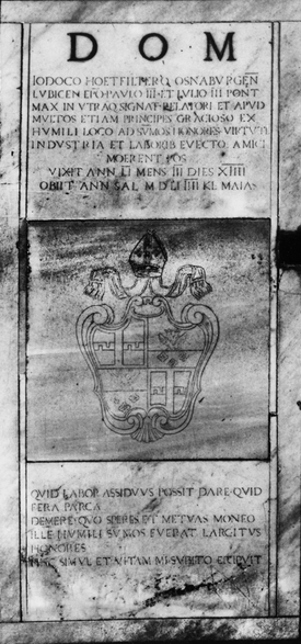 Grabplatte des Lübecker Bischofs Jodokus Hodfilter (1500-1551) in Santa Maria dell’Anima, Rom